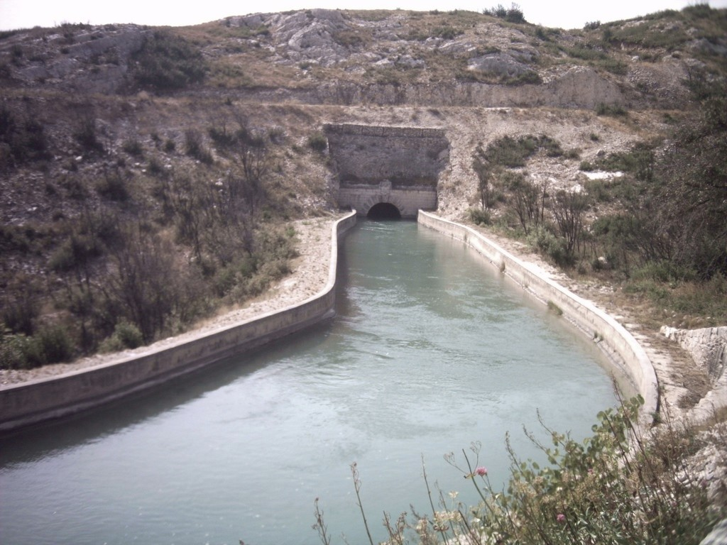 Un passage en souterrain au nord de Coudoux. Vue vers l'ouest depuis la route des Quatre Termes (vallon du Berratin). Tunnel d'environ 102 m de long ; à l'autre bout du tunnel sur la gauche se trouve une station de pompage. Le prochain tunnel dans cette direction est le souterrain de la Baume.